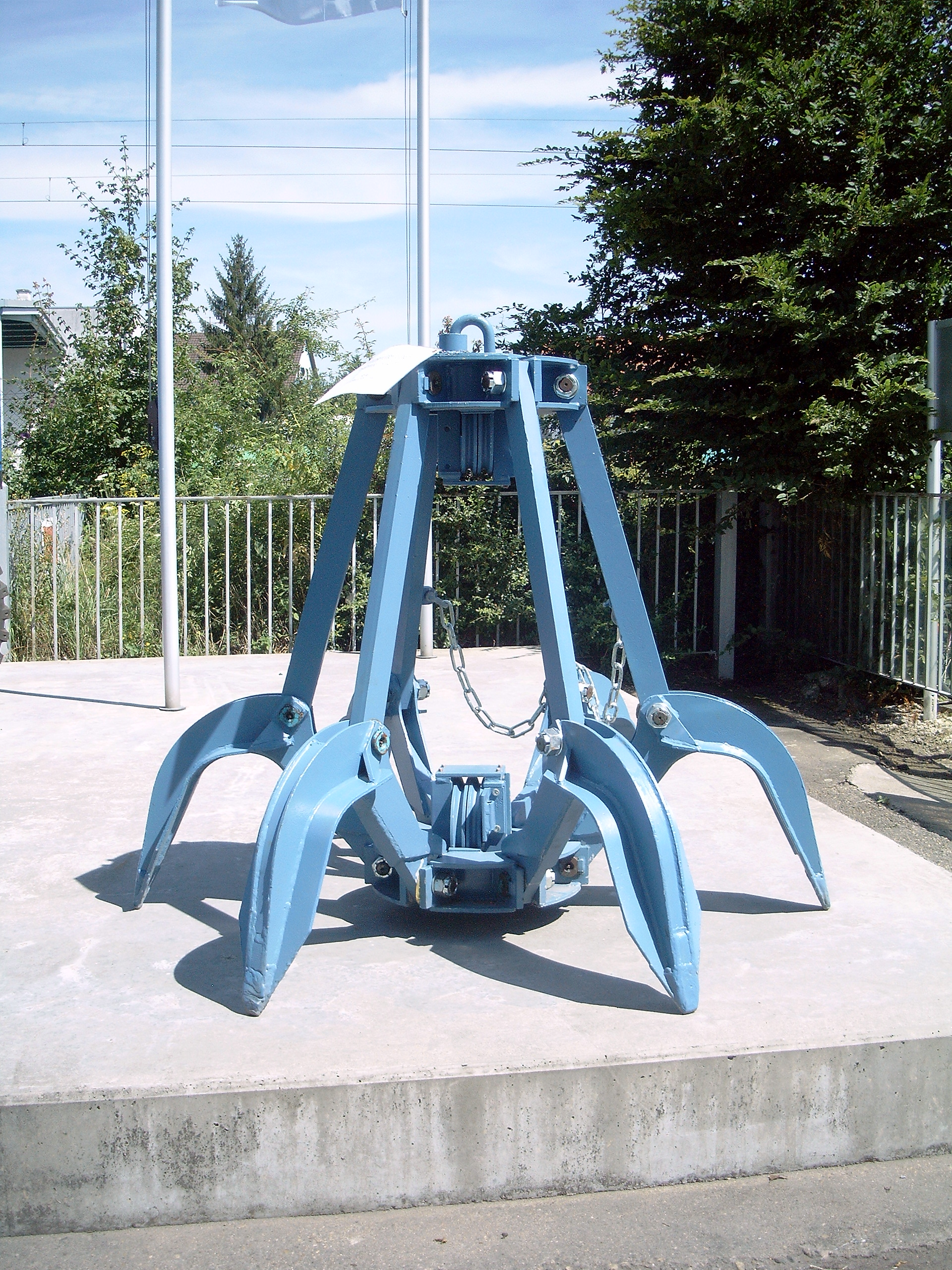 Fuchs sechsarmiger Polypgreifer beim 50. Jubiläum des Herstellers in Bad Schönborn